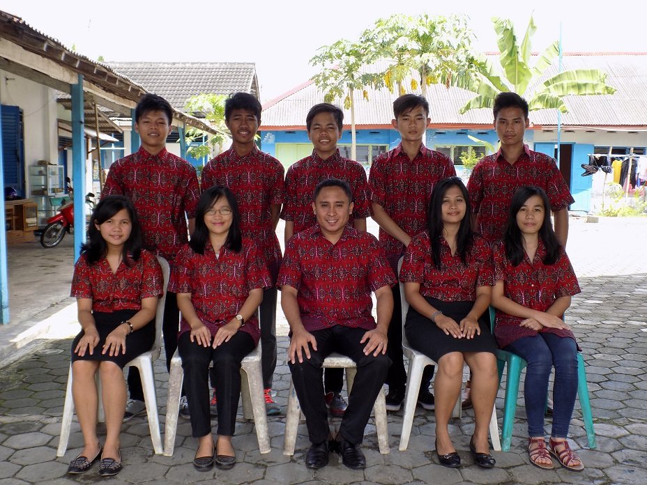 Foto bersama guru dan siswa SMTK SETIA